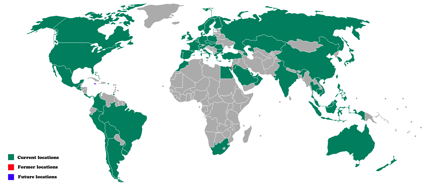 List of countries with Starbucks (September 2018)